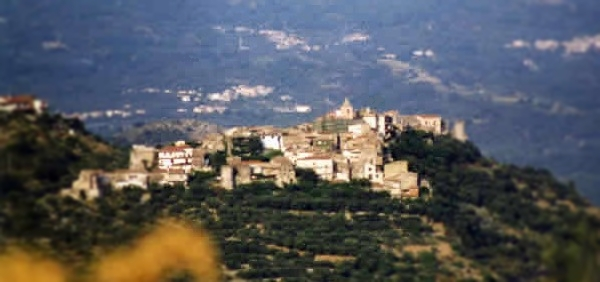 View of the Suio Alto, Castelforte (LT), Provincia di Latina, Regione Lazio (Latina Province, Latium Region, Italy) town center.